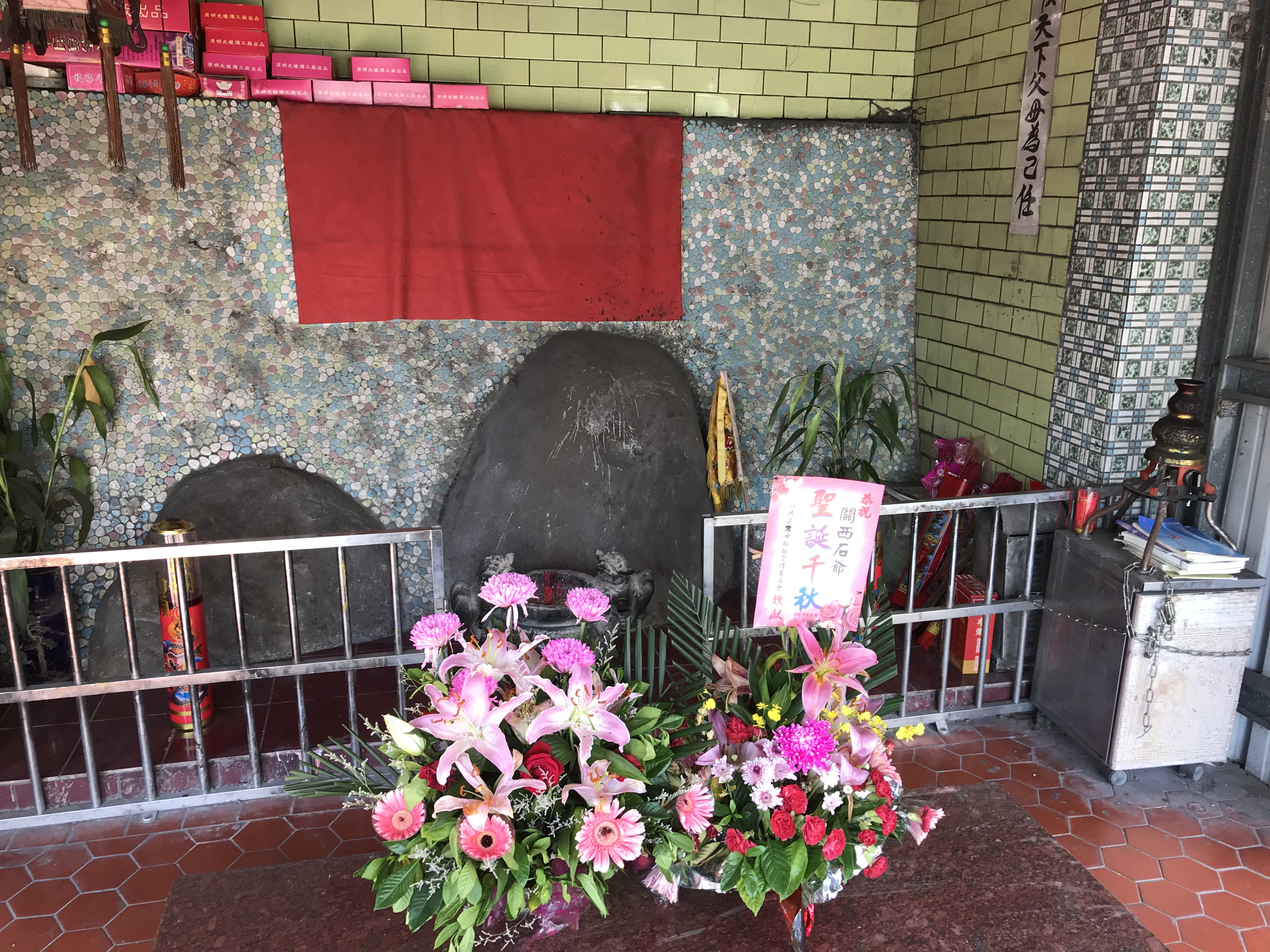 關西石爺亭石爺石婆